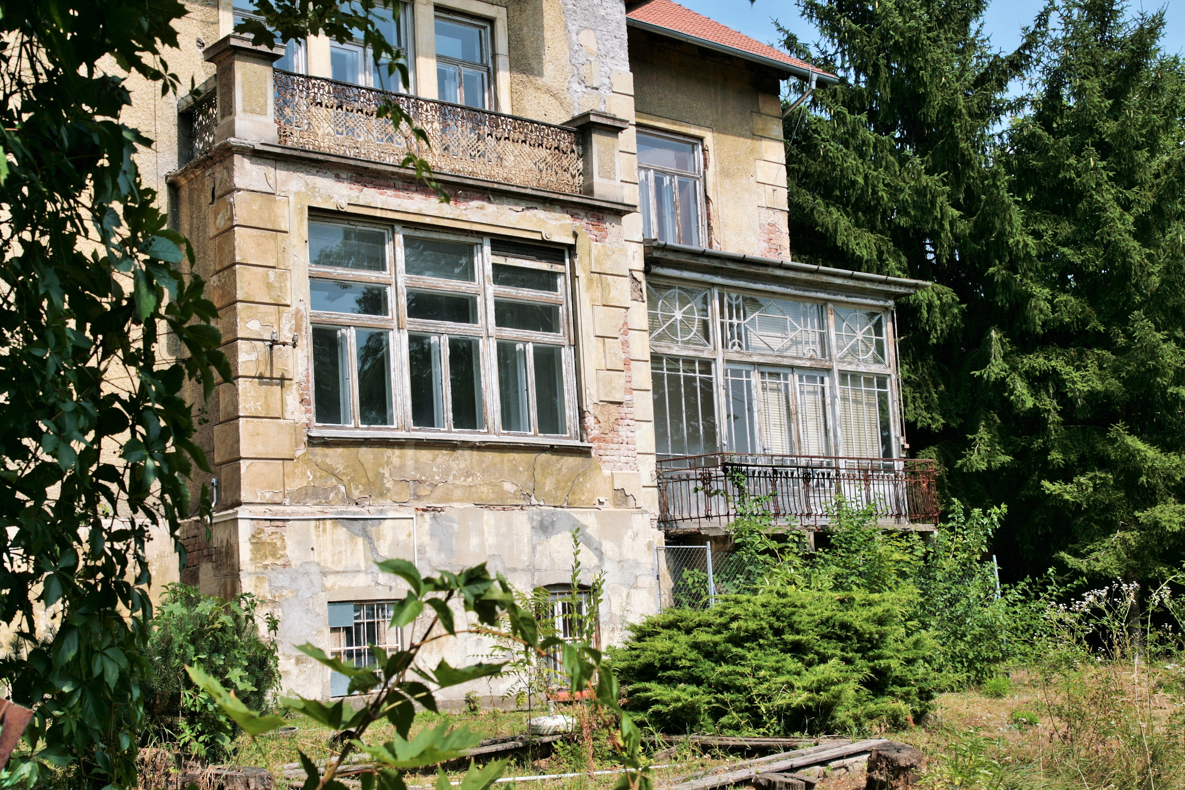 Arnoldova vila v Drobného ulici č. o. 26 v Brně-Černých Polích. Jihozápadní průčelí.